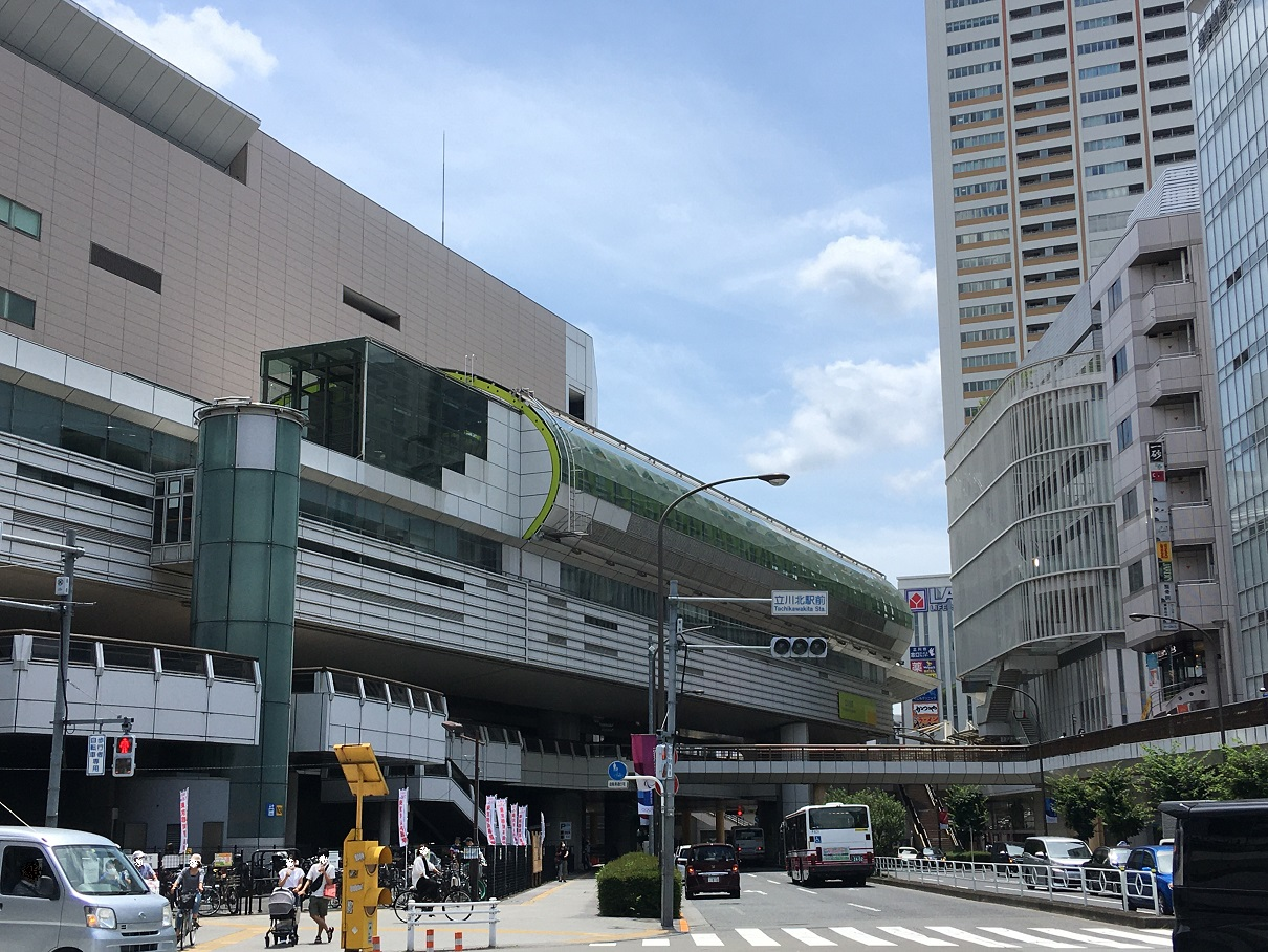 立川北駅（北側より撮影）